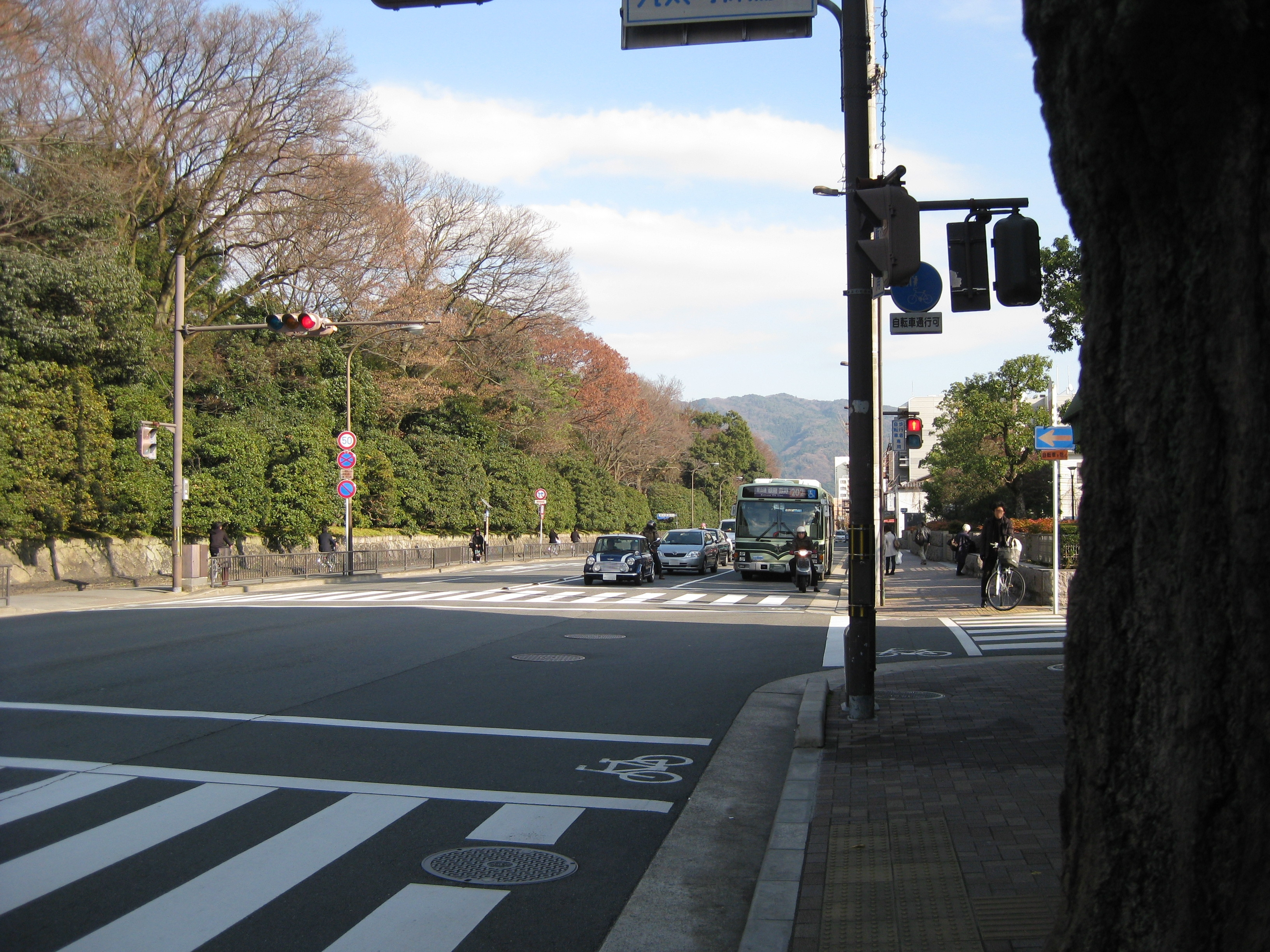 京都市中京区 丸太町柳馬場から東方面